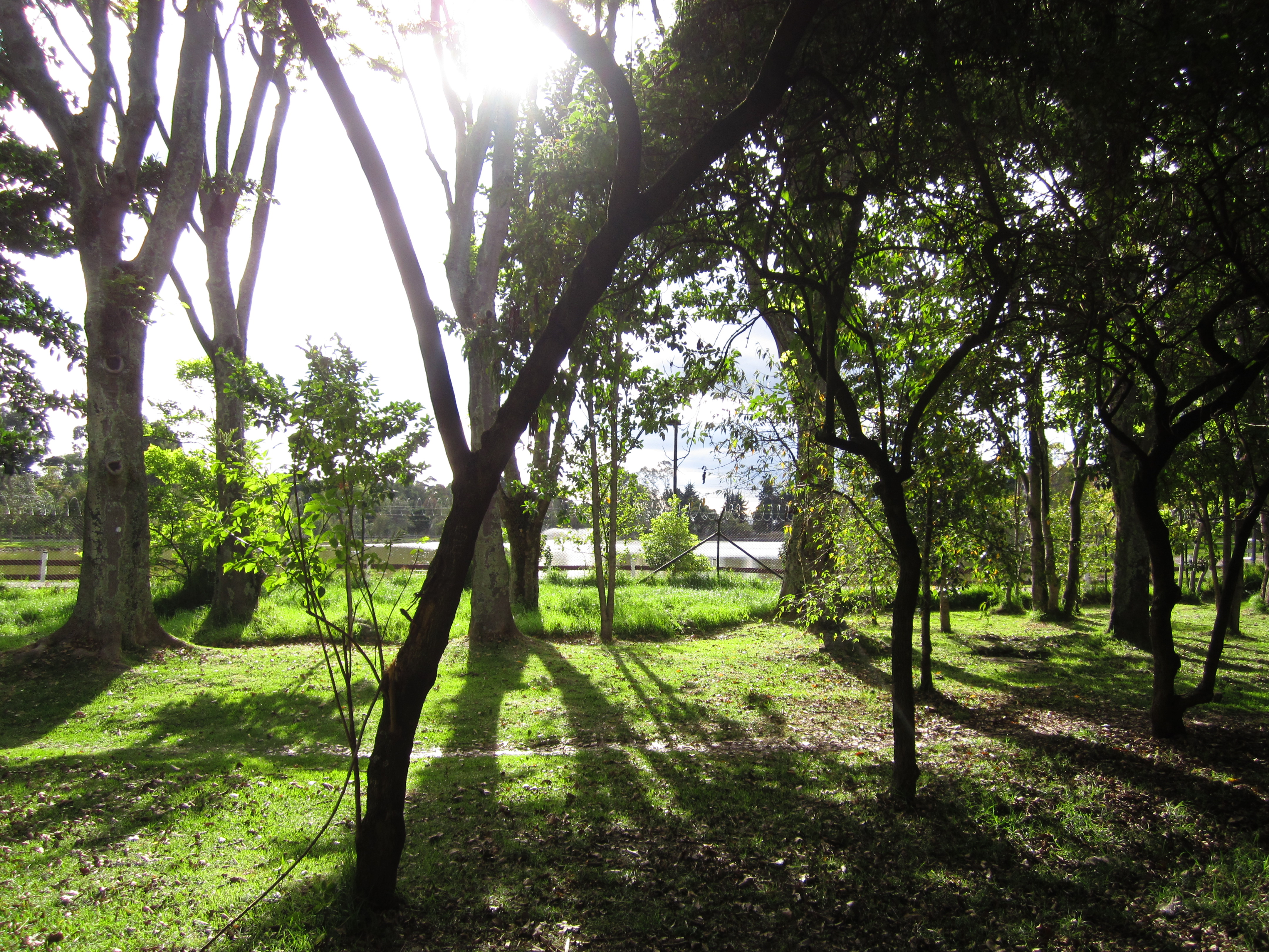 Humedal de Córdoba